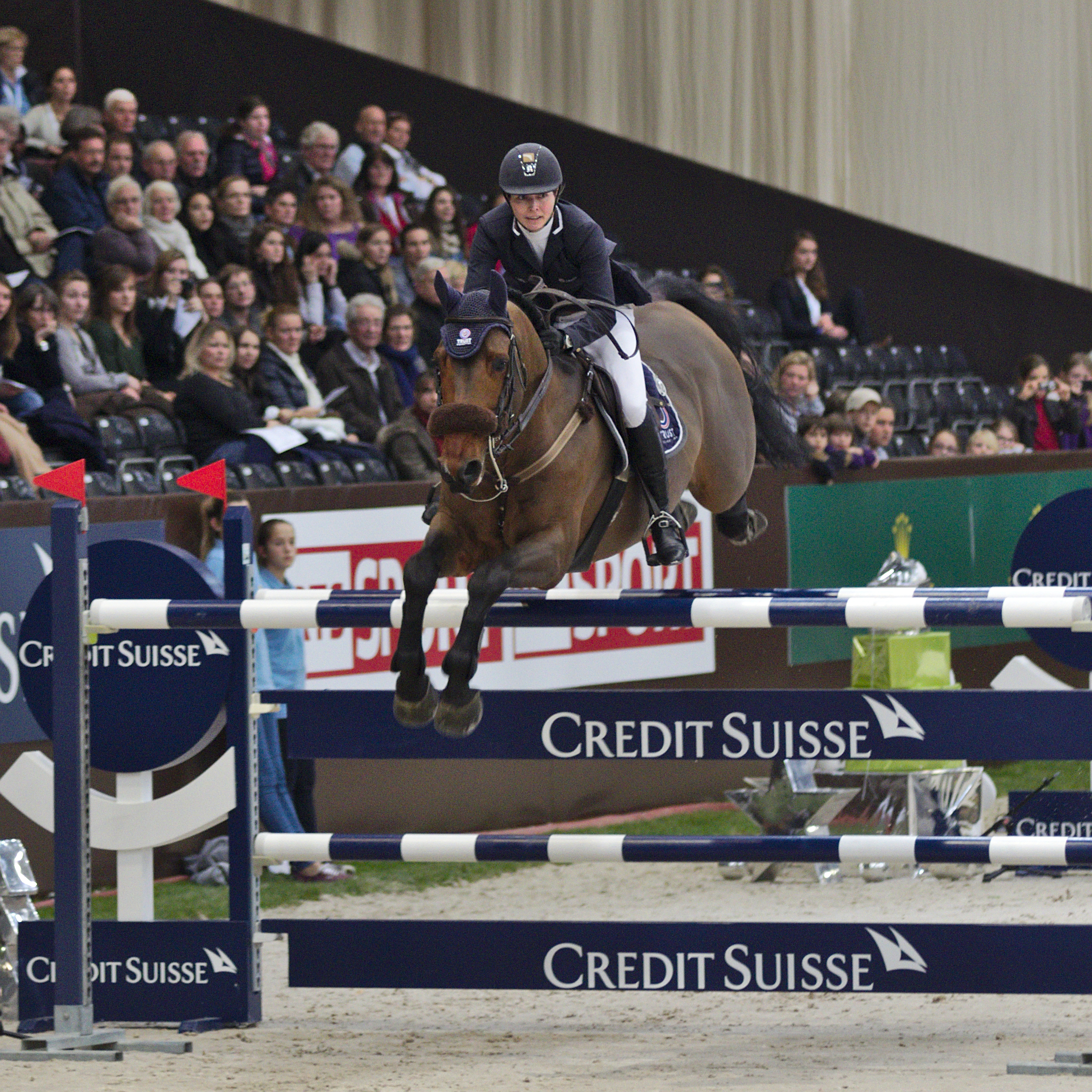 CHI Genève 2013 - 20131213 - Christina Liebherr et L.B. Eagle Eye